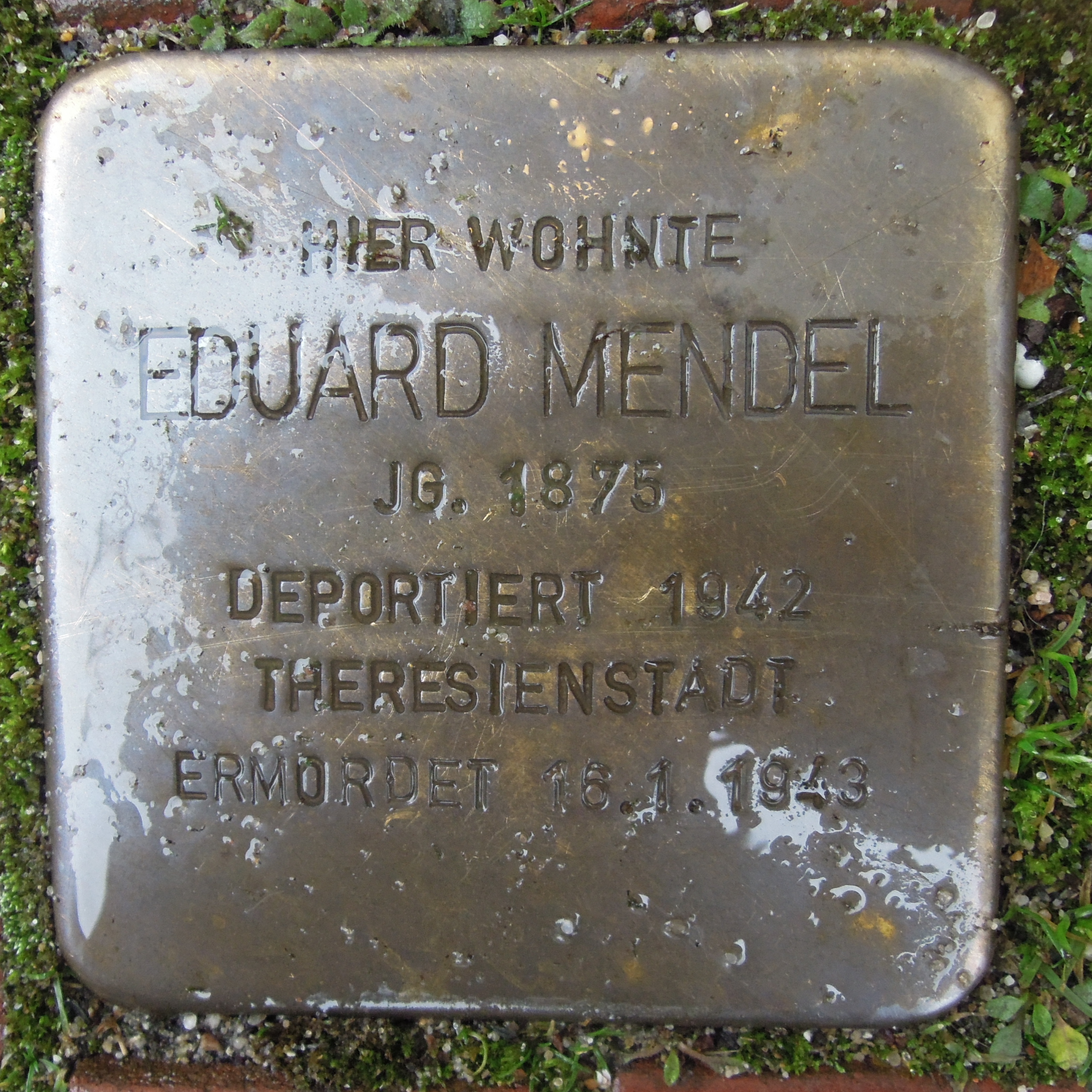 Stolperstein in Straelen, Venloer Straße 24 für Eduard Mendel